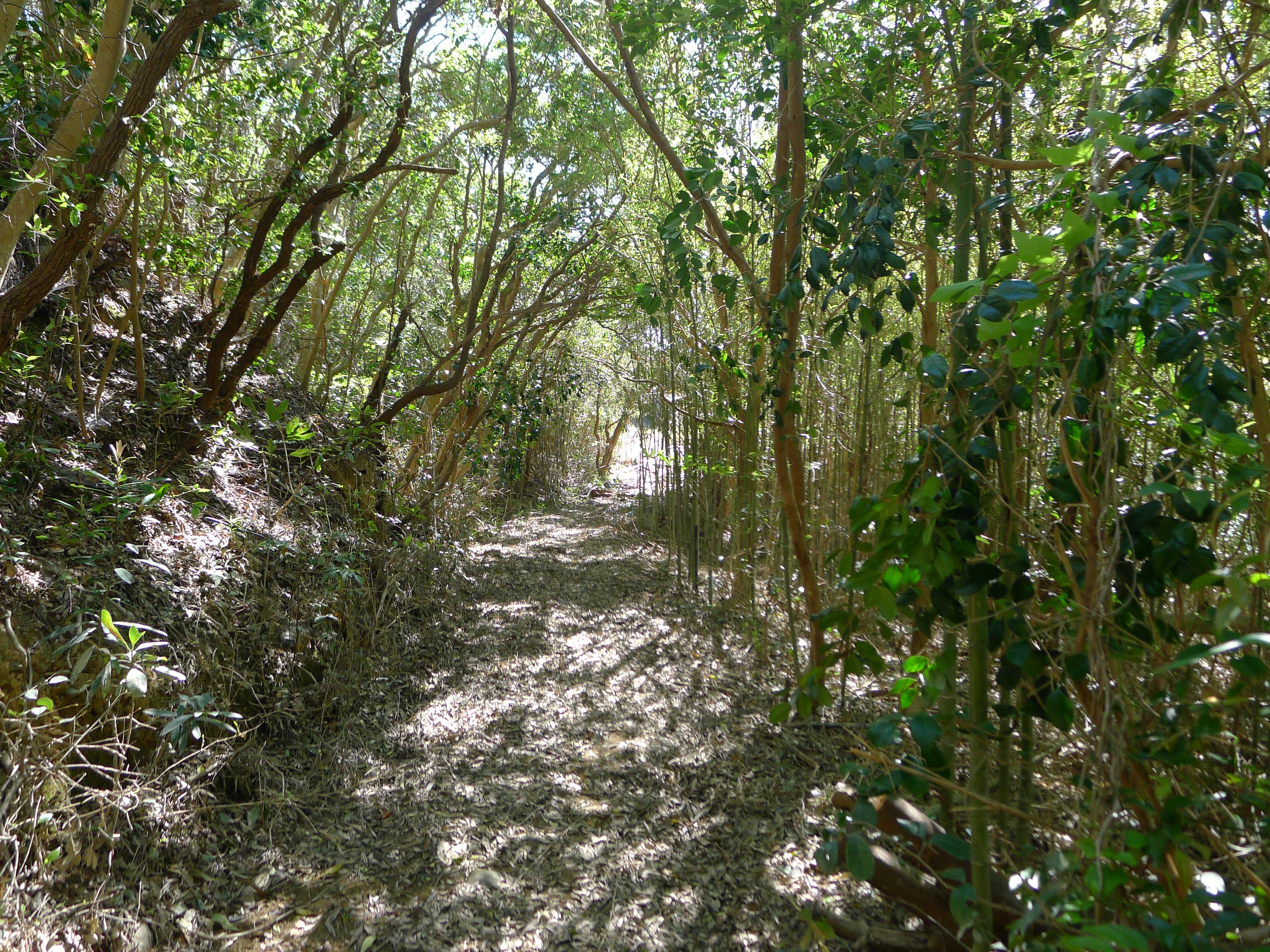 熊野古道紀伊路（和歌山県みなべ町）